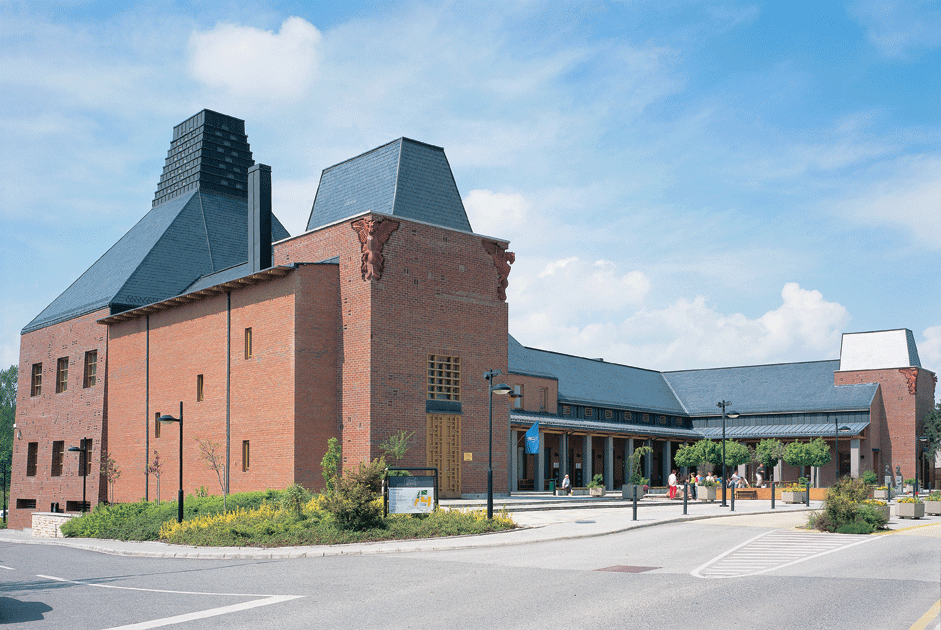 Herend Porceláneum 1997-98